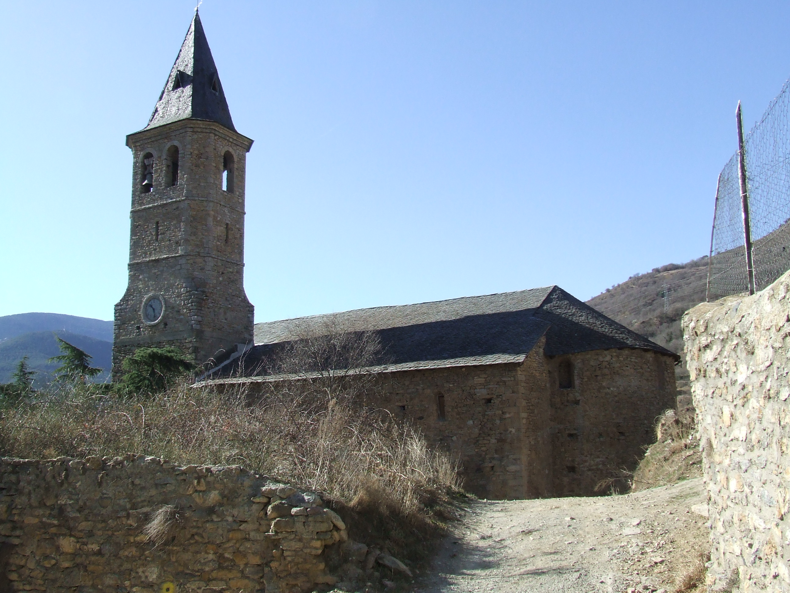 Sant Feliu de Sort (Pallars Sobirà)